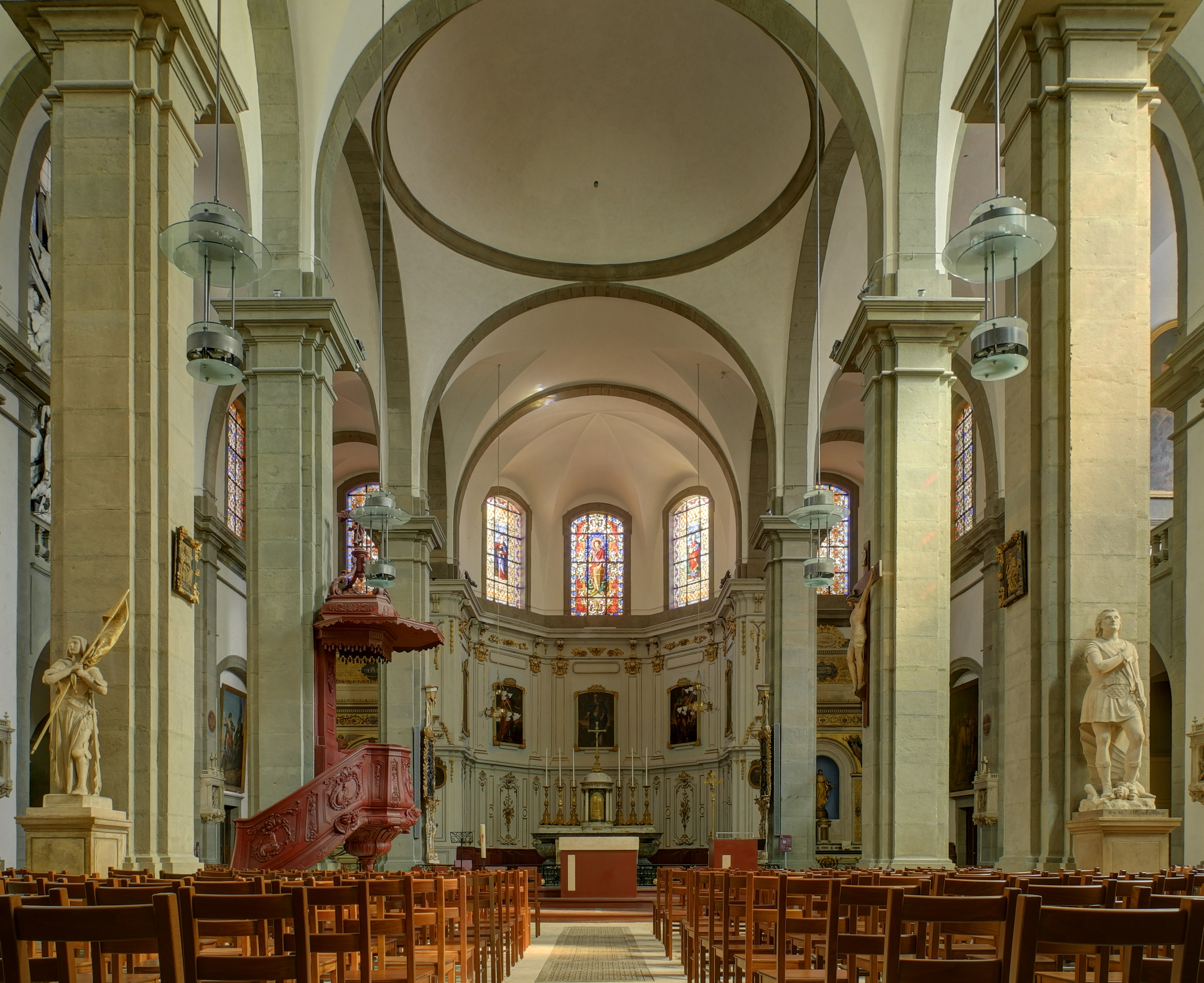 Église Saint-Georges de Vesoul : la nef (HDR).